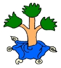 Glifo Náhuatl del municipio de Alafajayucan, Hidalgo